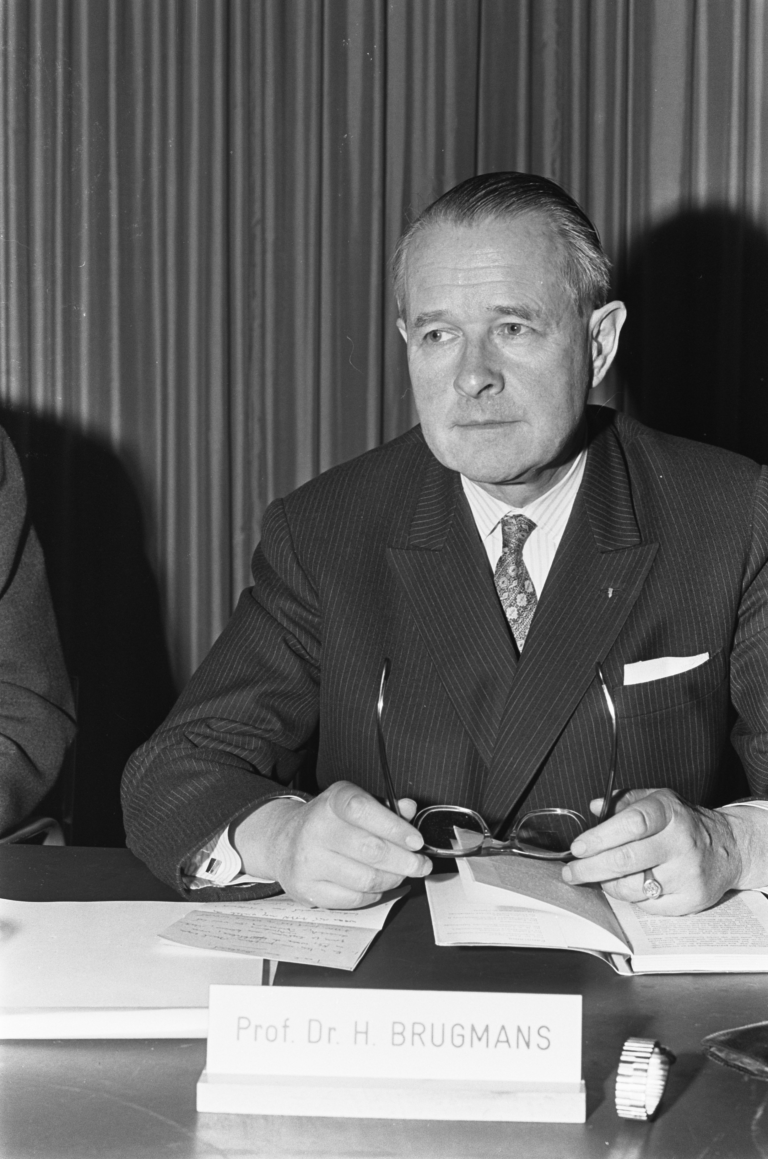 Collectie / Archief : Fotocollectie Anefo Reportage / Serie : [ onbekend ] Beschrijving : Nederlands Congres in Doelen te Rotterdam, nummer 1 en 2 prof. dr. H. Brugmans , nummer 3 en 4 prof. dr. Heerema Datum : 17 februari 1967 Locatie : Rotterdam, Zuid-Holland Trefwoorden : congressen Persoonsnaam : Prof. Dr. H. Brugmans, Prof. Dr. Heerema Instellingsnaam : Doelen, De Fotograaf : Nijs, Jac. de / Anefo Auteursrechthebbende : Nationaal Archief Materiaalsoort : Negatief (zwart/wit) Nummer archiefinventaris : bekijk toegang 2.24.01.05 Bestanddeelnummer : 920-0843